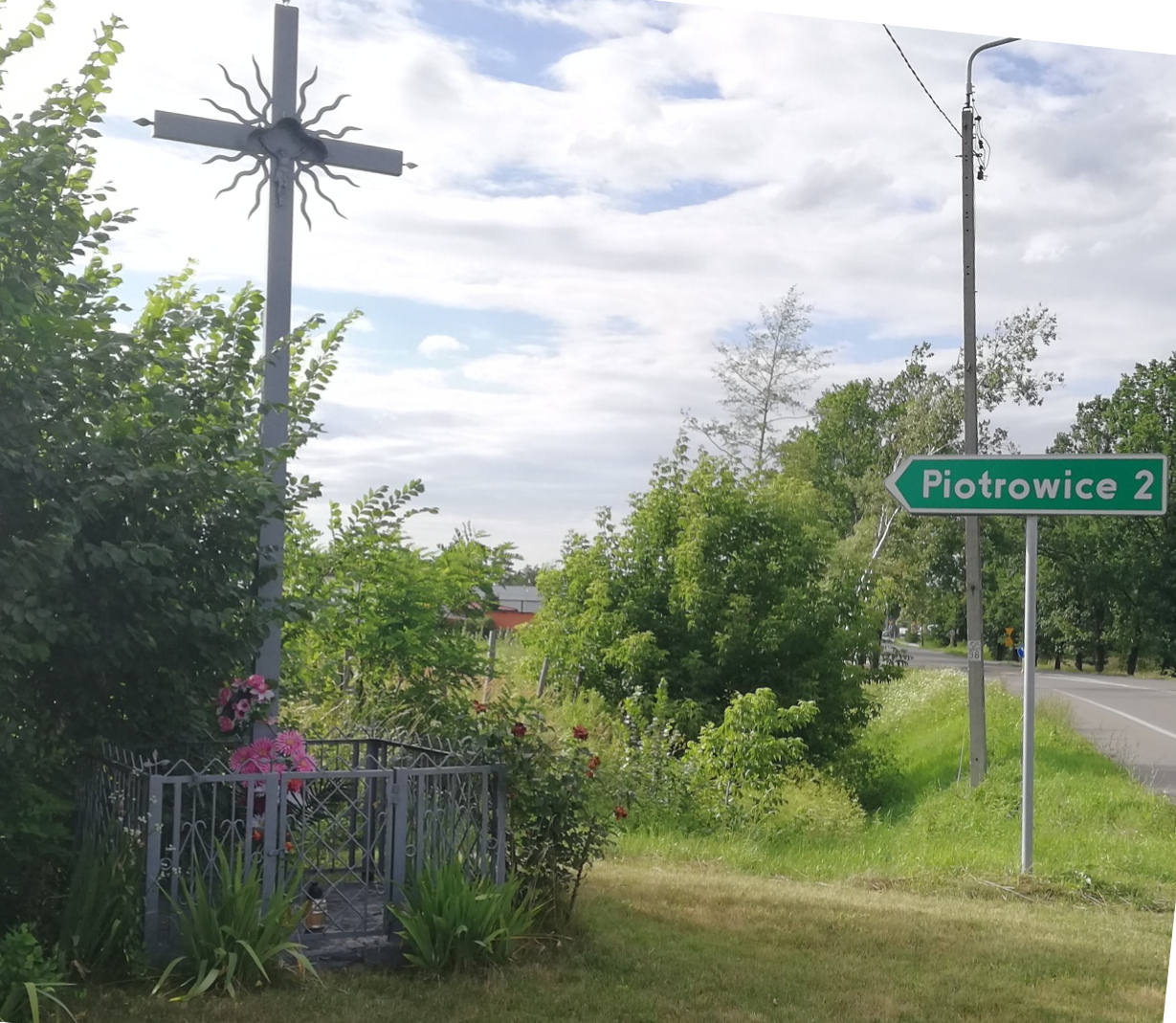 Tablica drogowa z nazwą wsi i krzyżLëtzebuergesch: Weekräiz op der Droga wojewódzka 801 an der Entrée vum Duerf